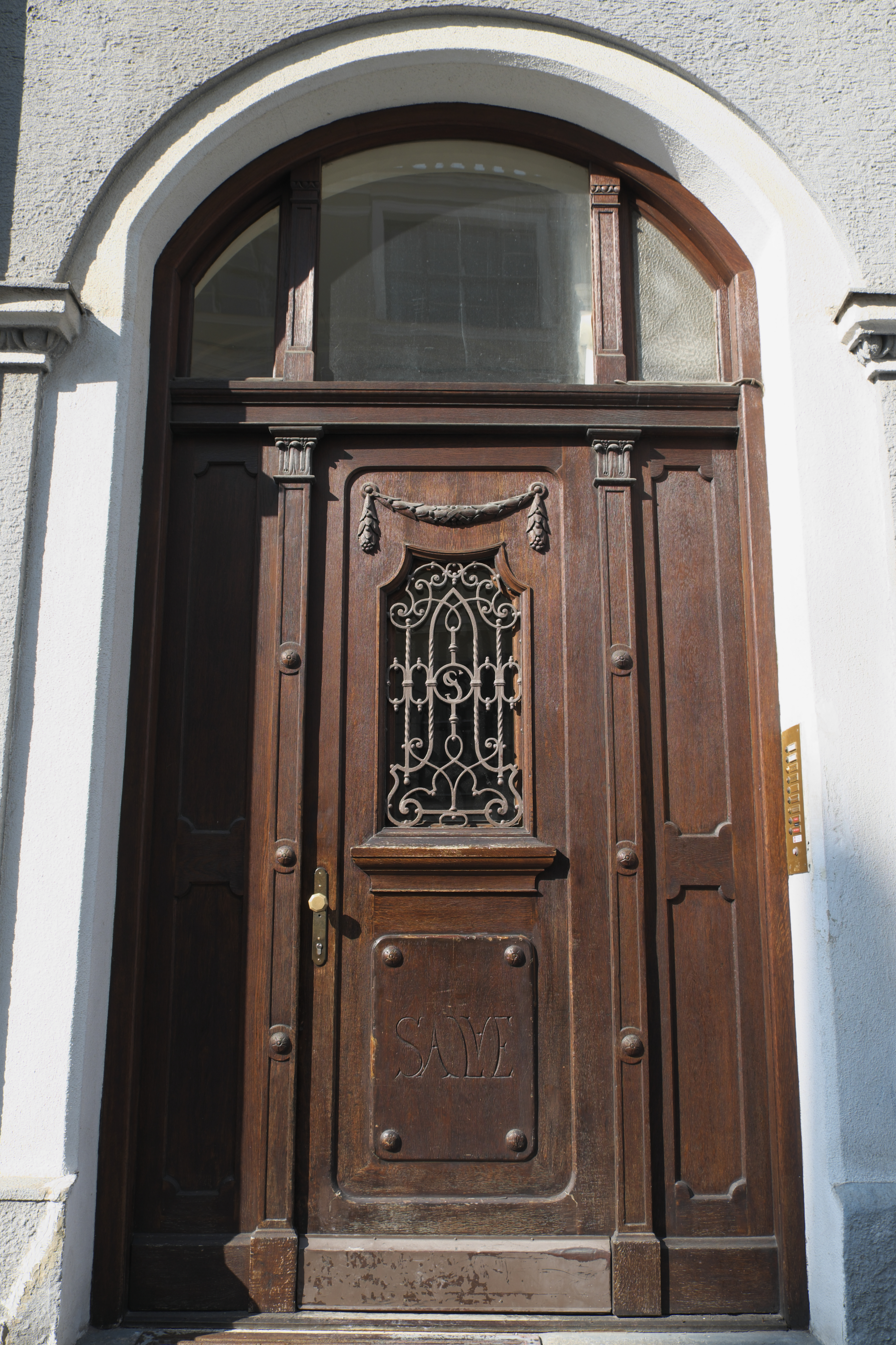 Wohnhaus in der Richard-Wagner-Straße 13 im Stadtbezirk Maxvorstad in München (Bayern/Deutschland), Haustür